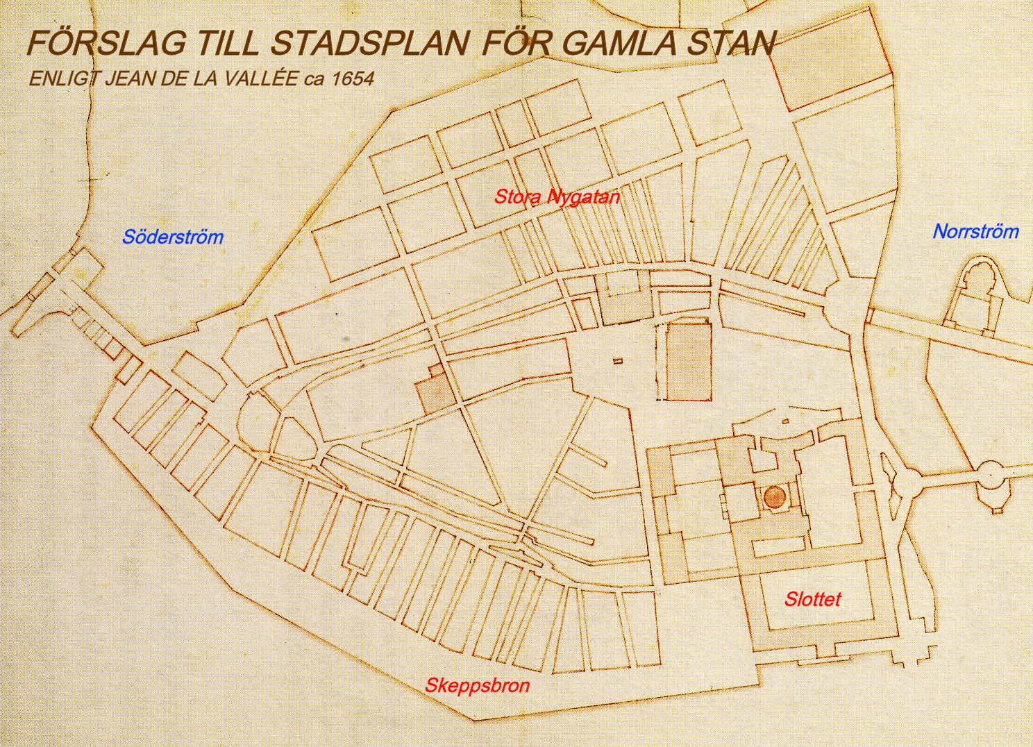 Förslag till stadsplan för Gamla stan (förklarande text har lagds in av Holger Ellgaard)